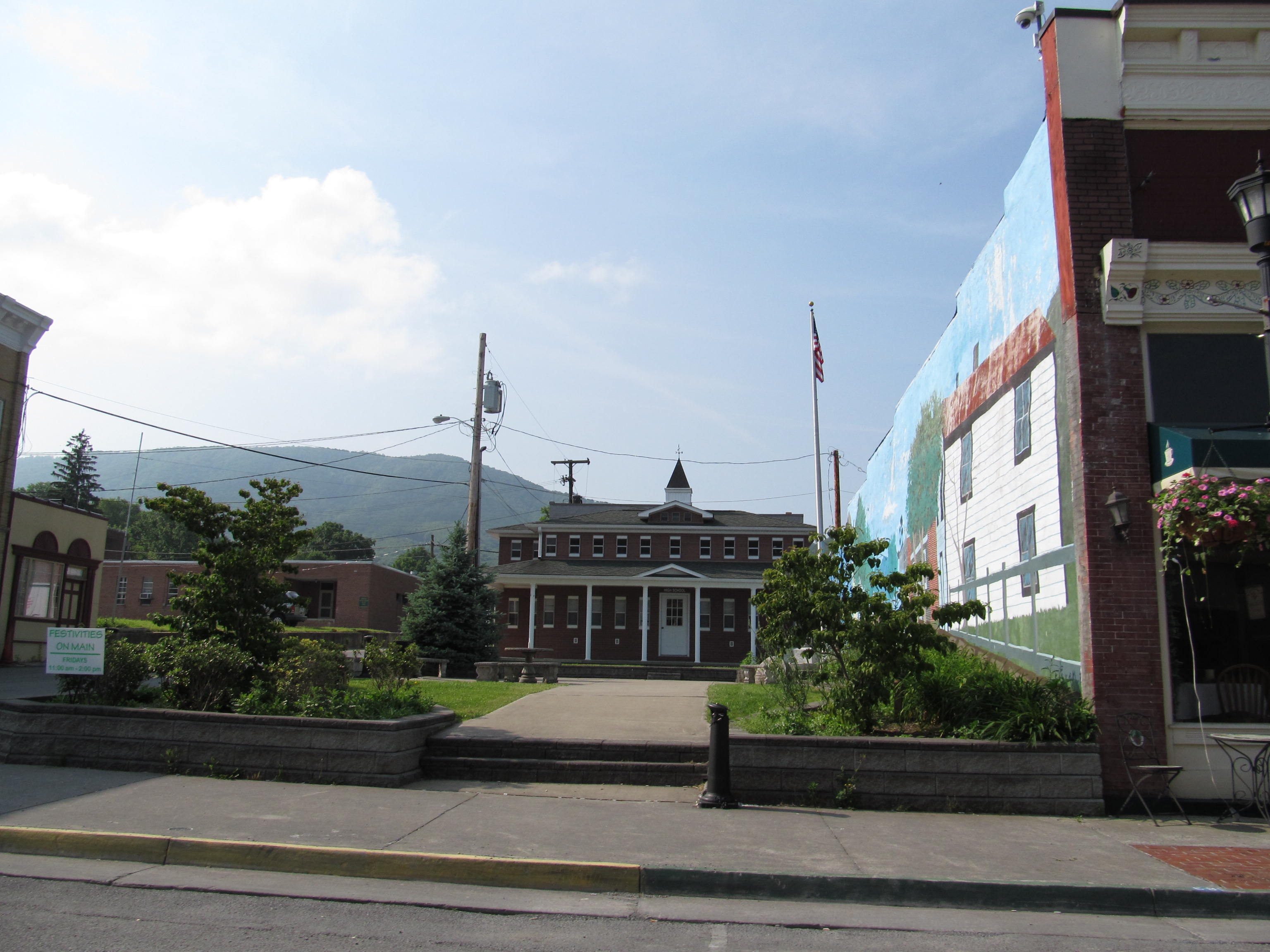 Tazewell, Virginia